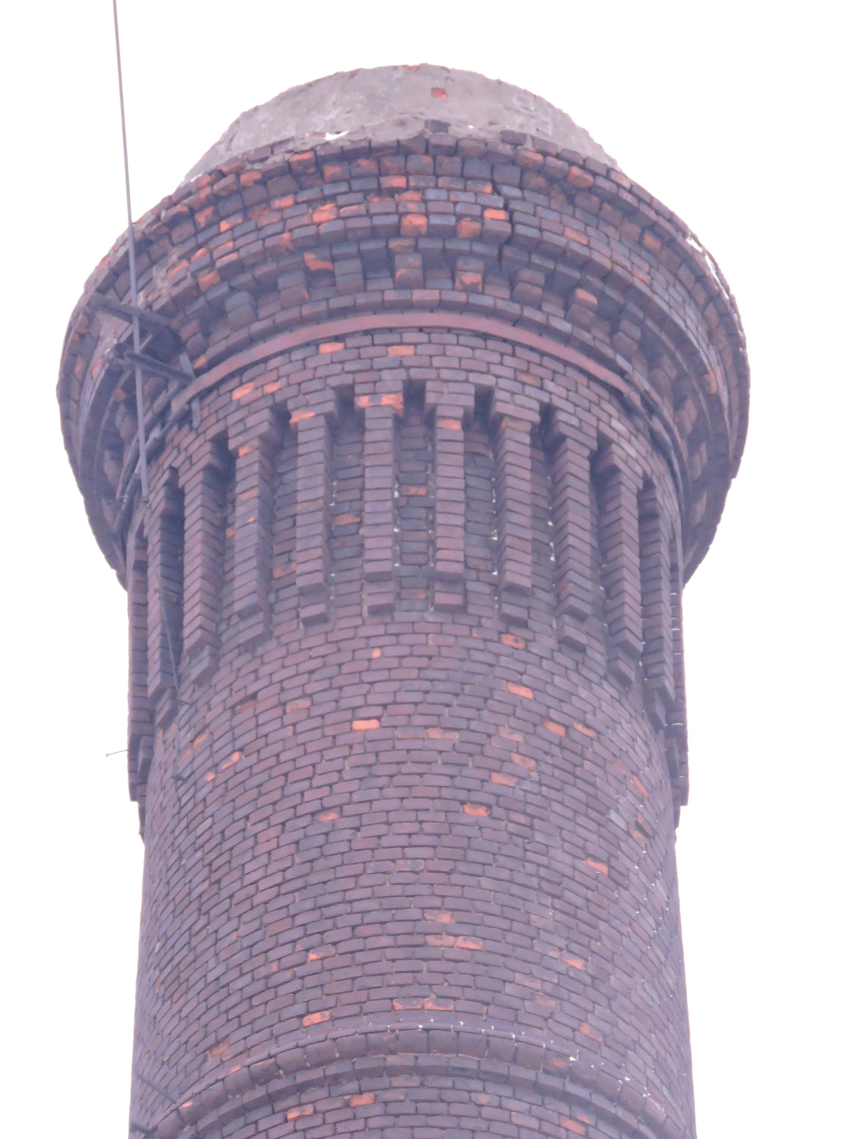 Оголовок дымовой трубы, характерной для фабрик царской России